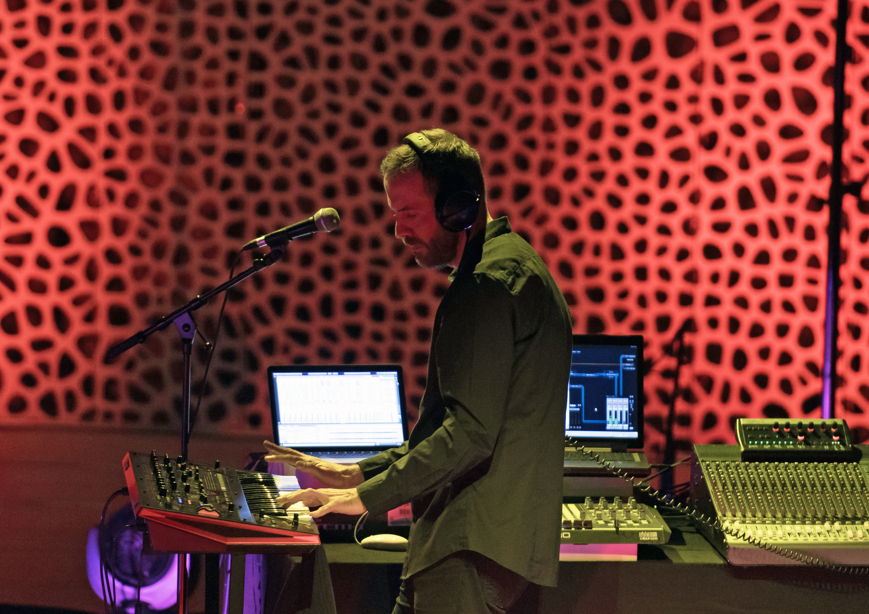 Tangerine Dream bei der Quantum of Electronic Evolution Tour in der Elbphilharmonie Hamburg 2018